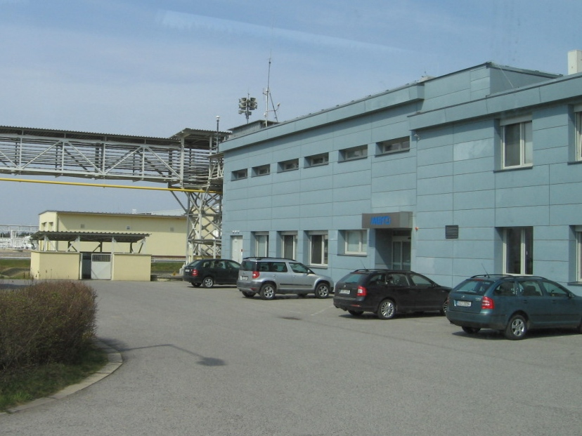 MERO, správní budova a velín.